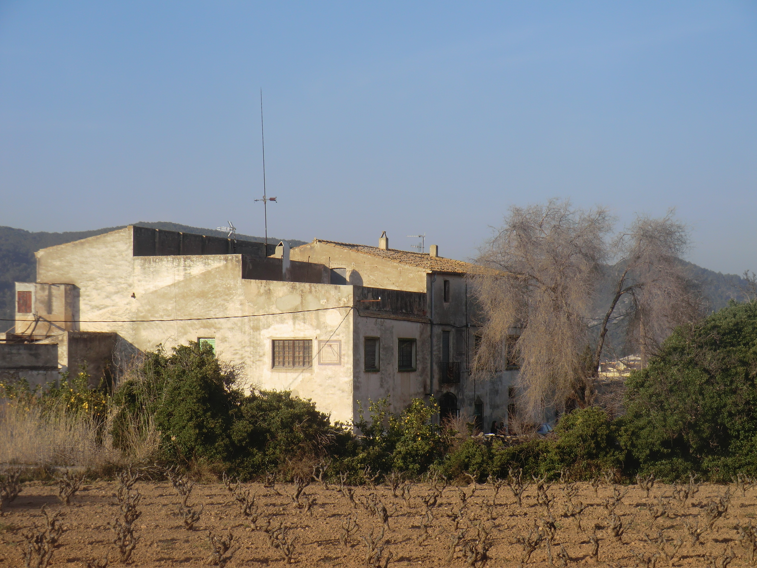 masia de Sant Pere de Ribes